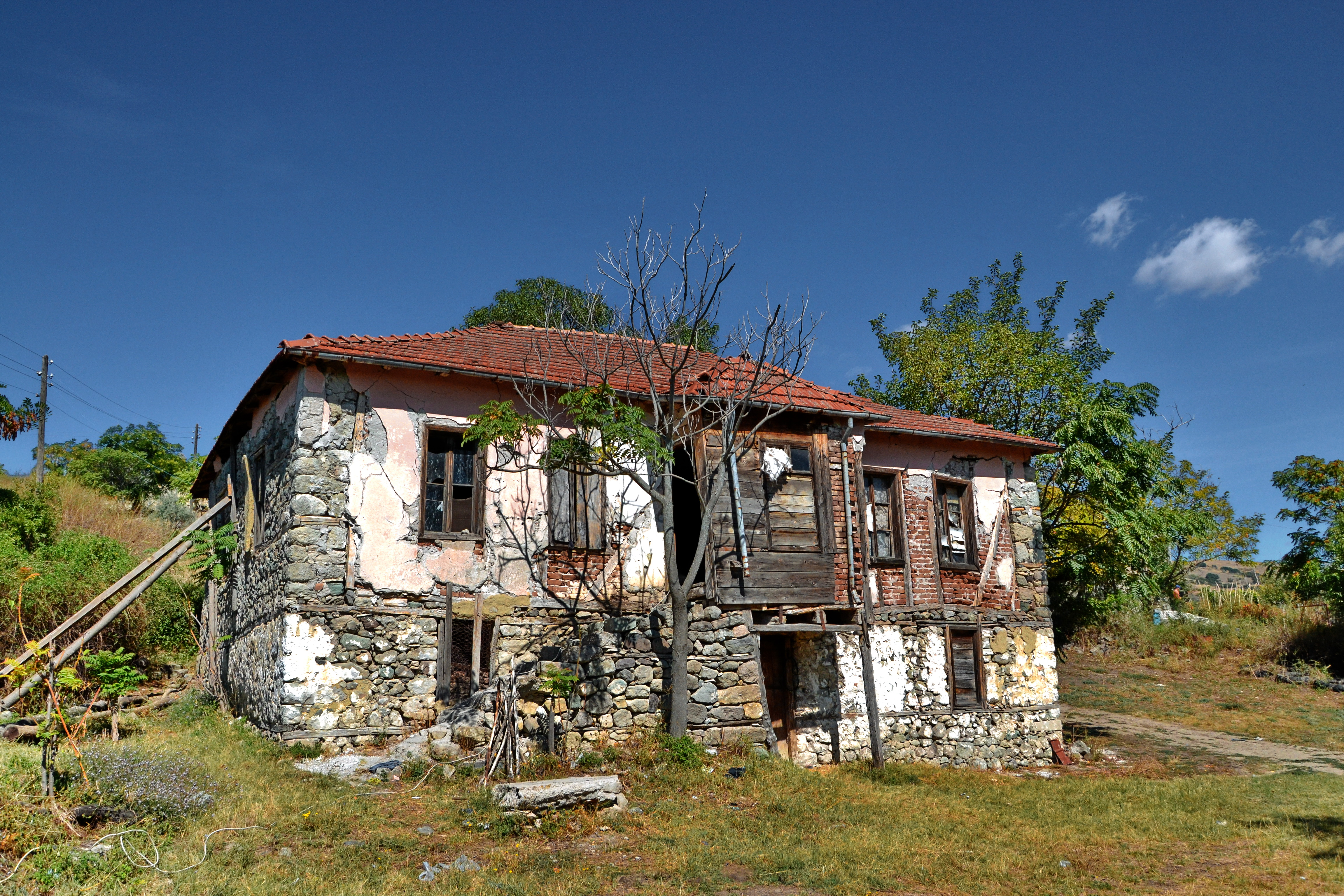 Старо училиште во с. Судик.